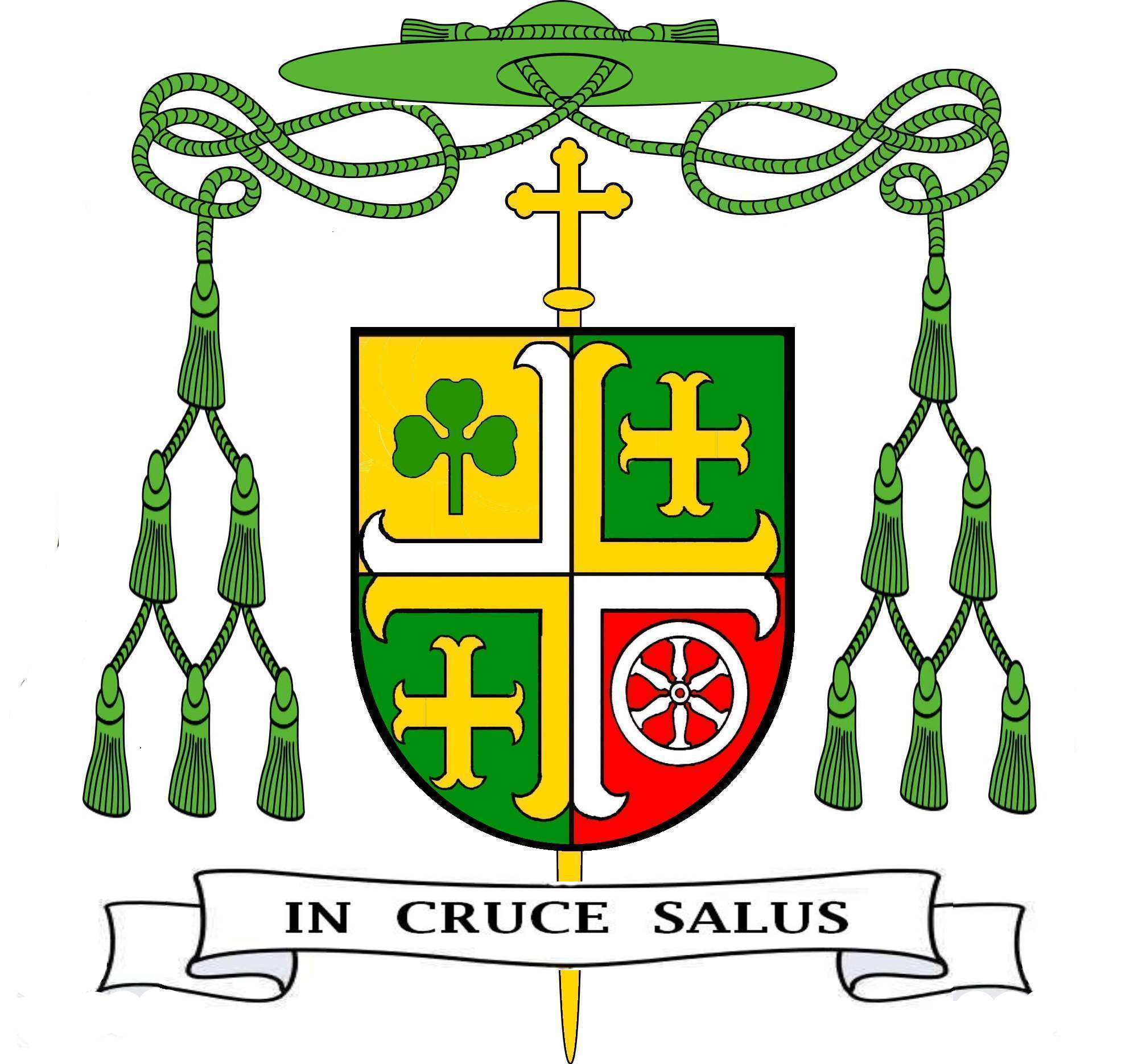 Wappen Josef Freusberg (1881-1964), Weihbischof in Fulda 1953-1964